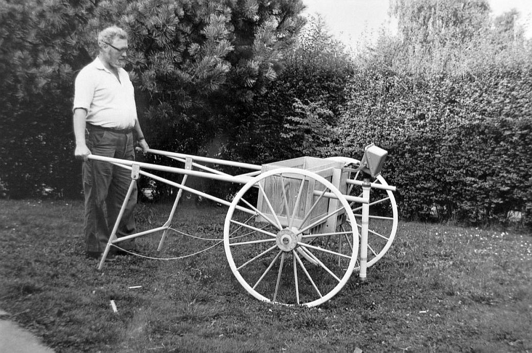 Scott med bombesøger